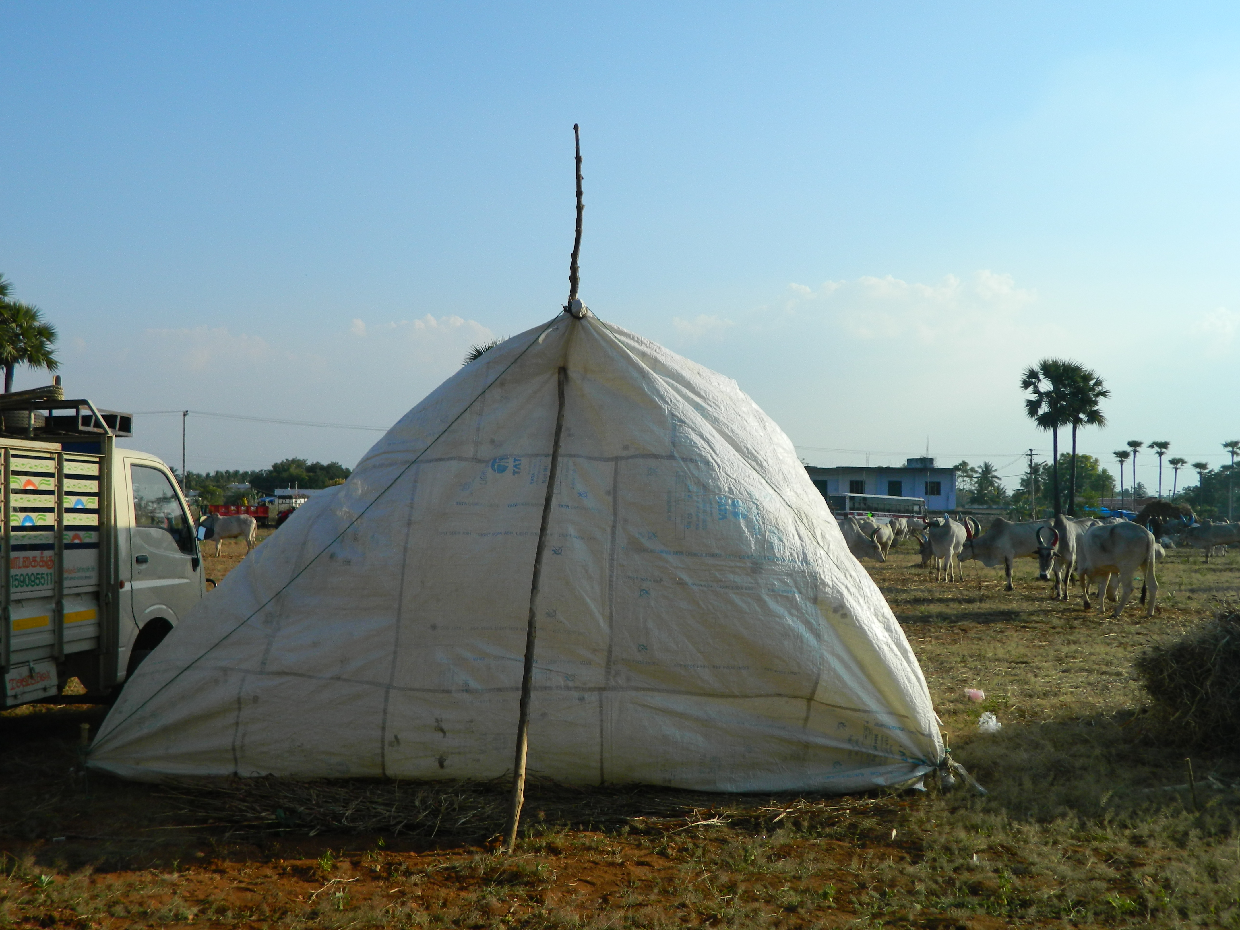 கூடாரம்